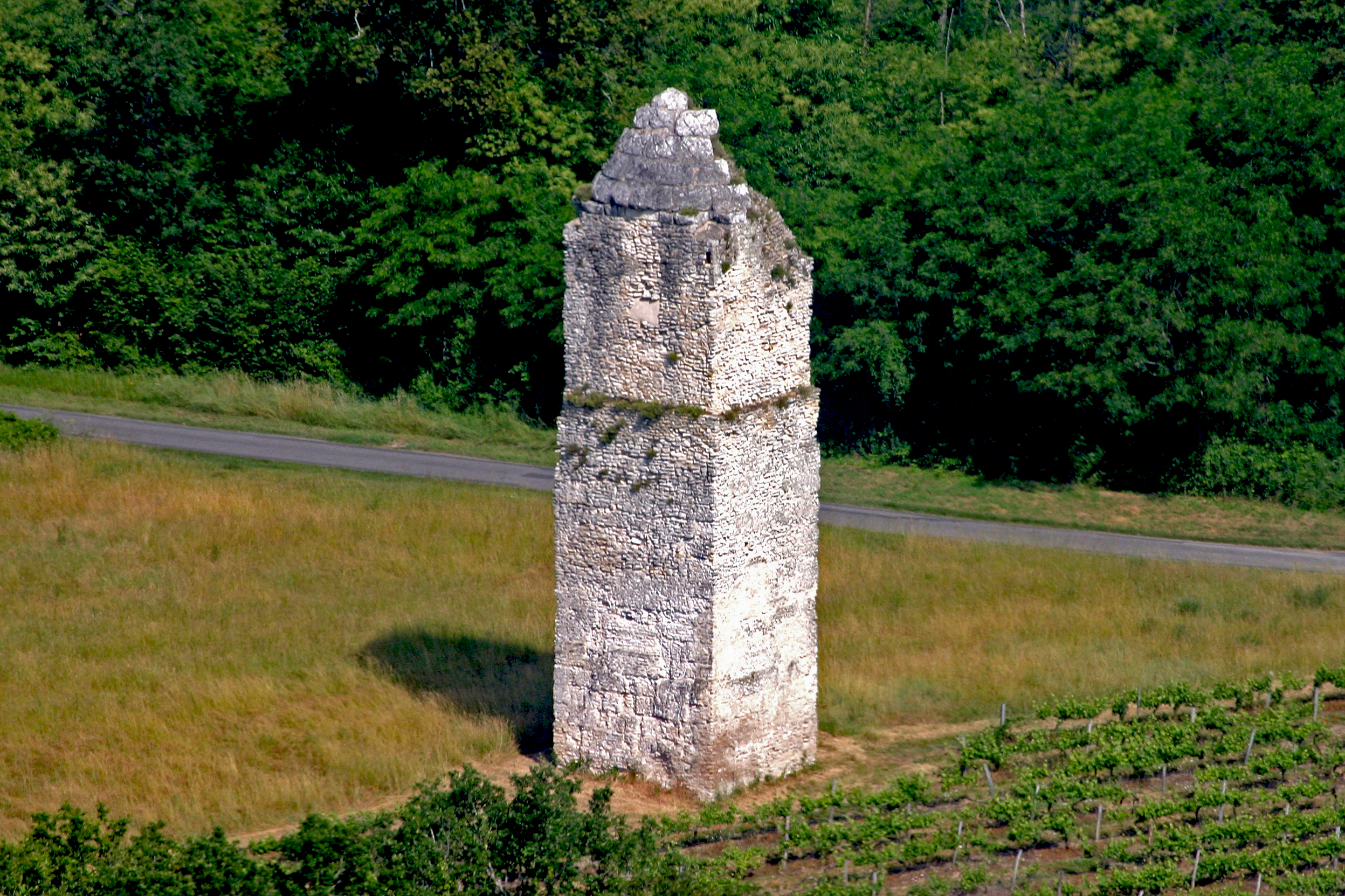 Saint-Romain-de-Benet Charente-Maritime. La Tour de Pirelonge. Pile ou fanal, en pierre,d'une hauteur de 25 mètres, son rôle présumé est celui de monument funéraire. .